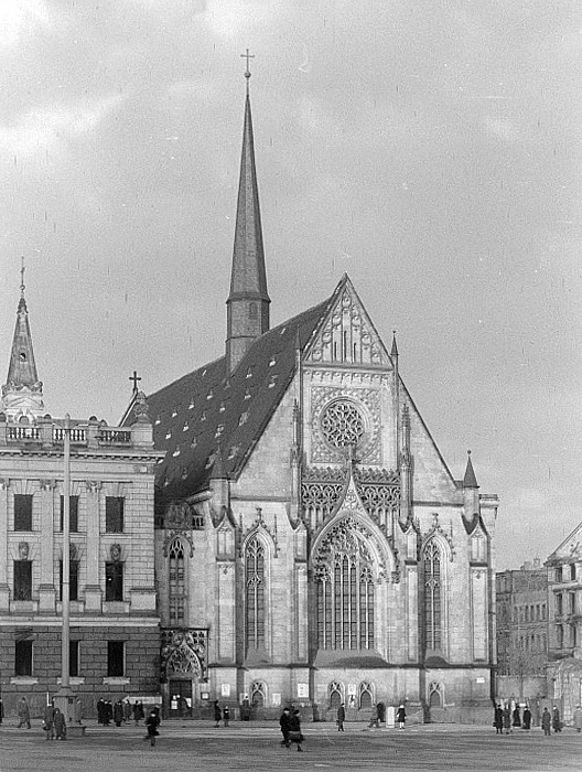 Original image description from the Deutsche Fotothek Augustusplatz mit Paulinerkirche